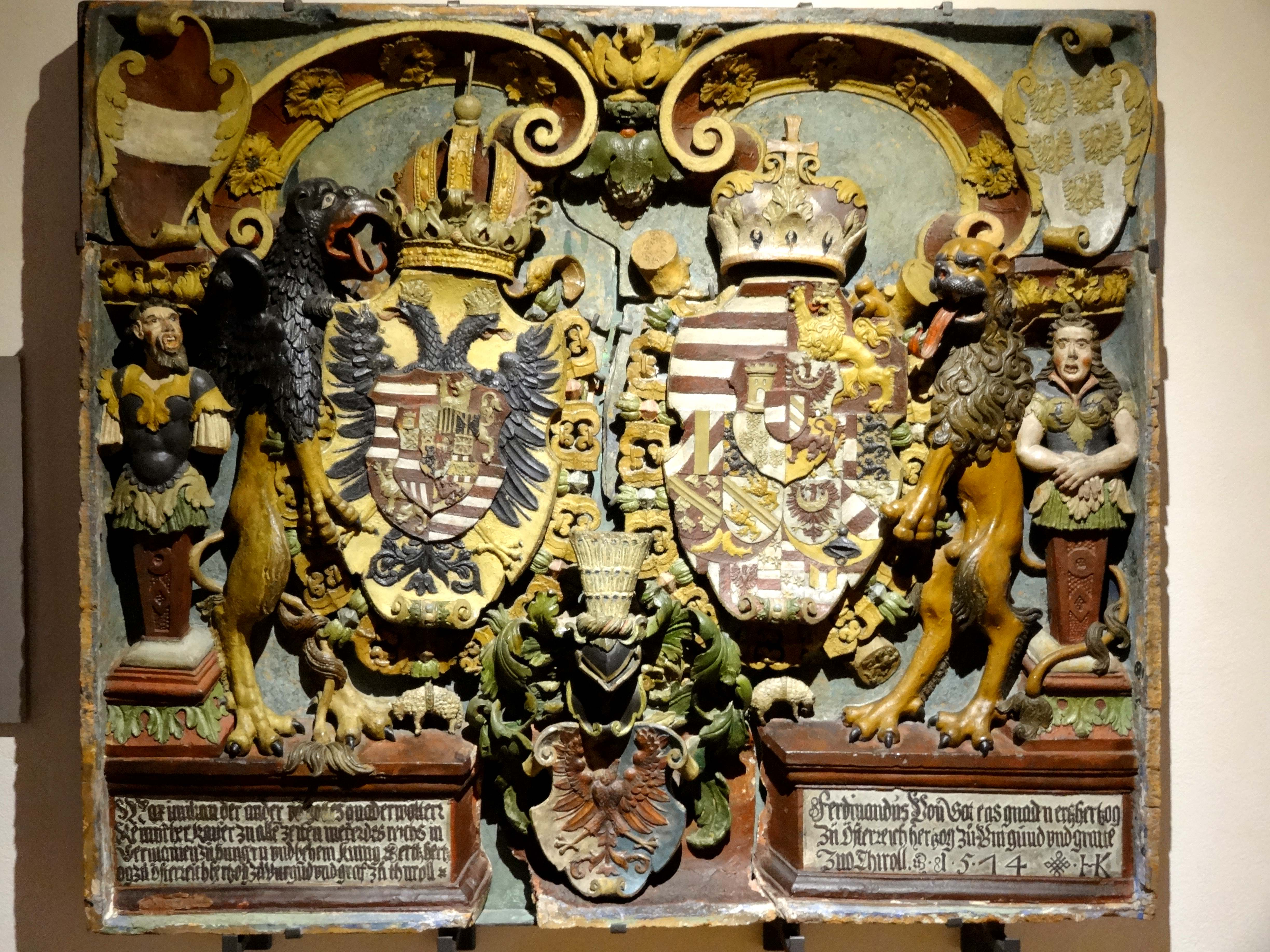 Habsburgische Wappentafel vom Kaufhaus, Irdenware, von Hans Kraut, 1574, Franziskanermuseum Villingen, Inv. 11859 Hans Kraut Alternative namesJohann Bartholomäus KrautDescription German ceramic artist and stovemaker Date of birth/deathcirca 1532late 16th centuryLocation of birth/deathSpaichingenRottweilAuthority control VIAF: 65102275 GND: 130022209